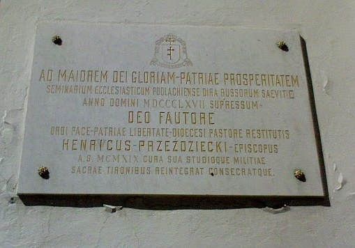 Janów Podlaski. Tablica pamiątkowa.